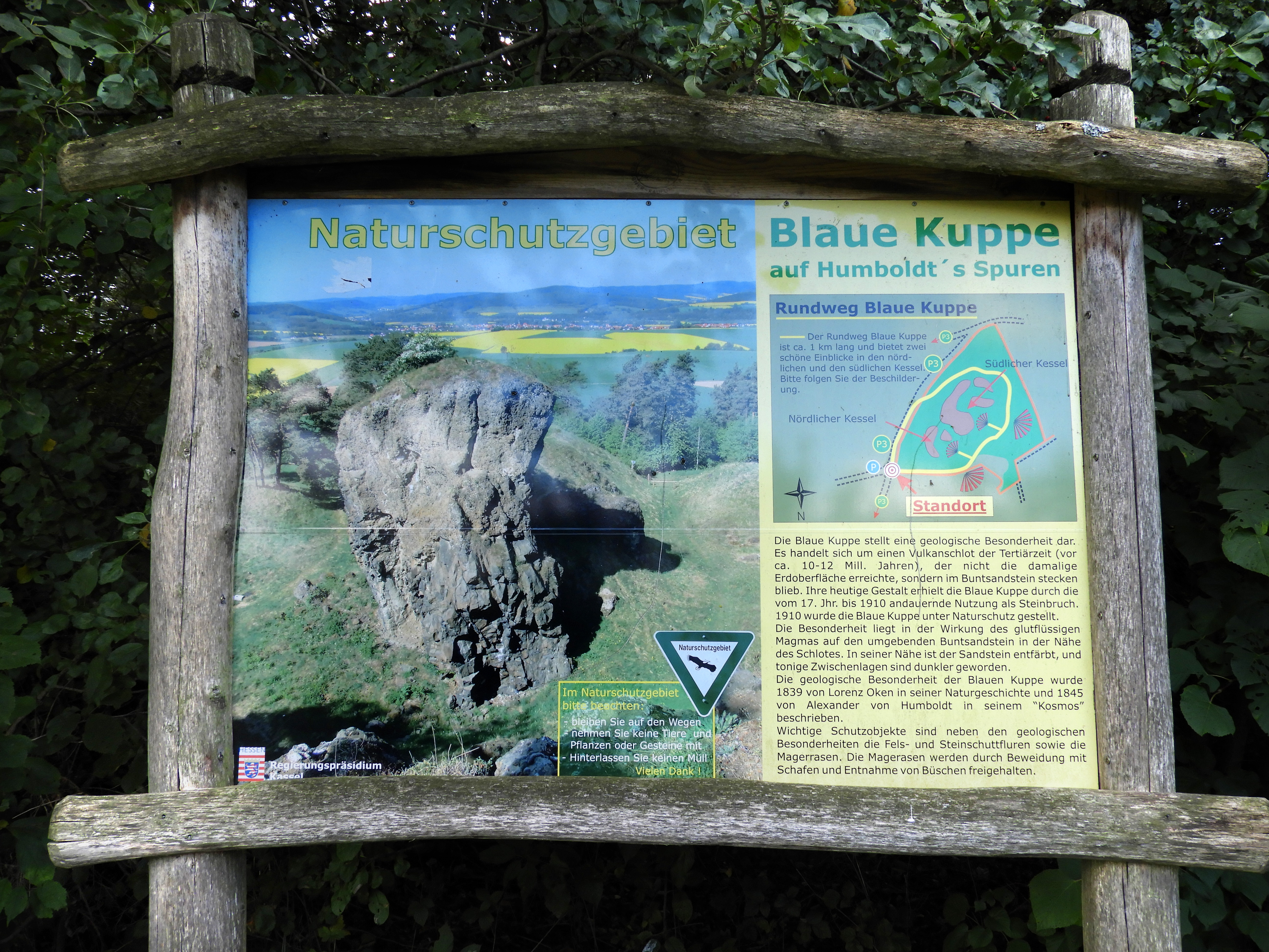 Informationstafel am Rundweg durch das Naturschutzgebiet Blaue Kuppe.